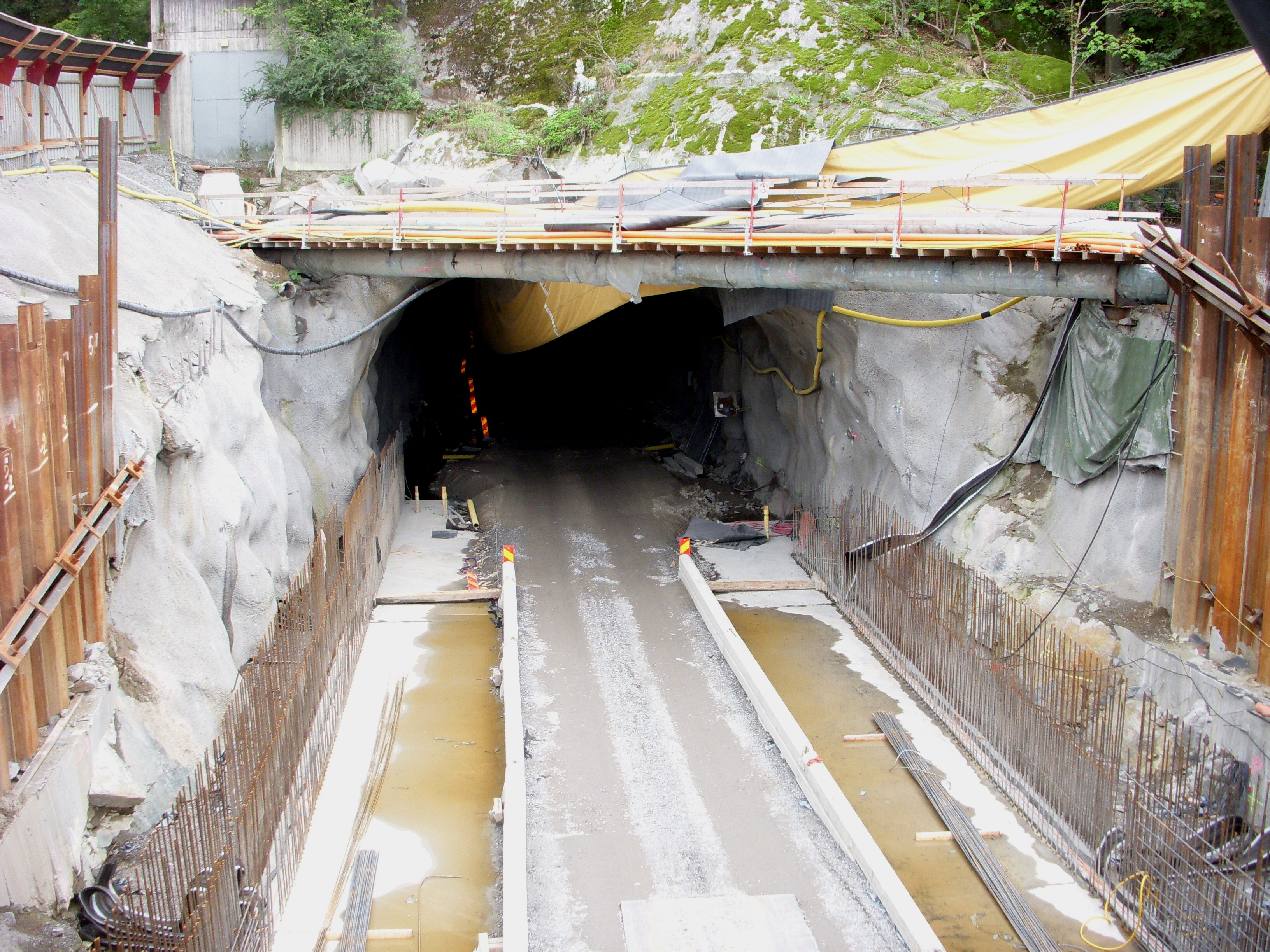 Blivande tunnel för Tvärbanan mellan Alvik och Ulvsundasjön